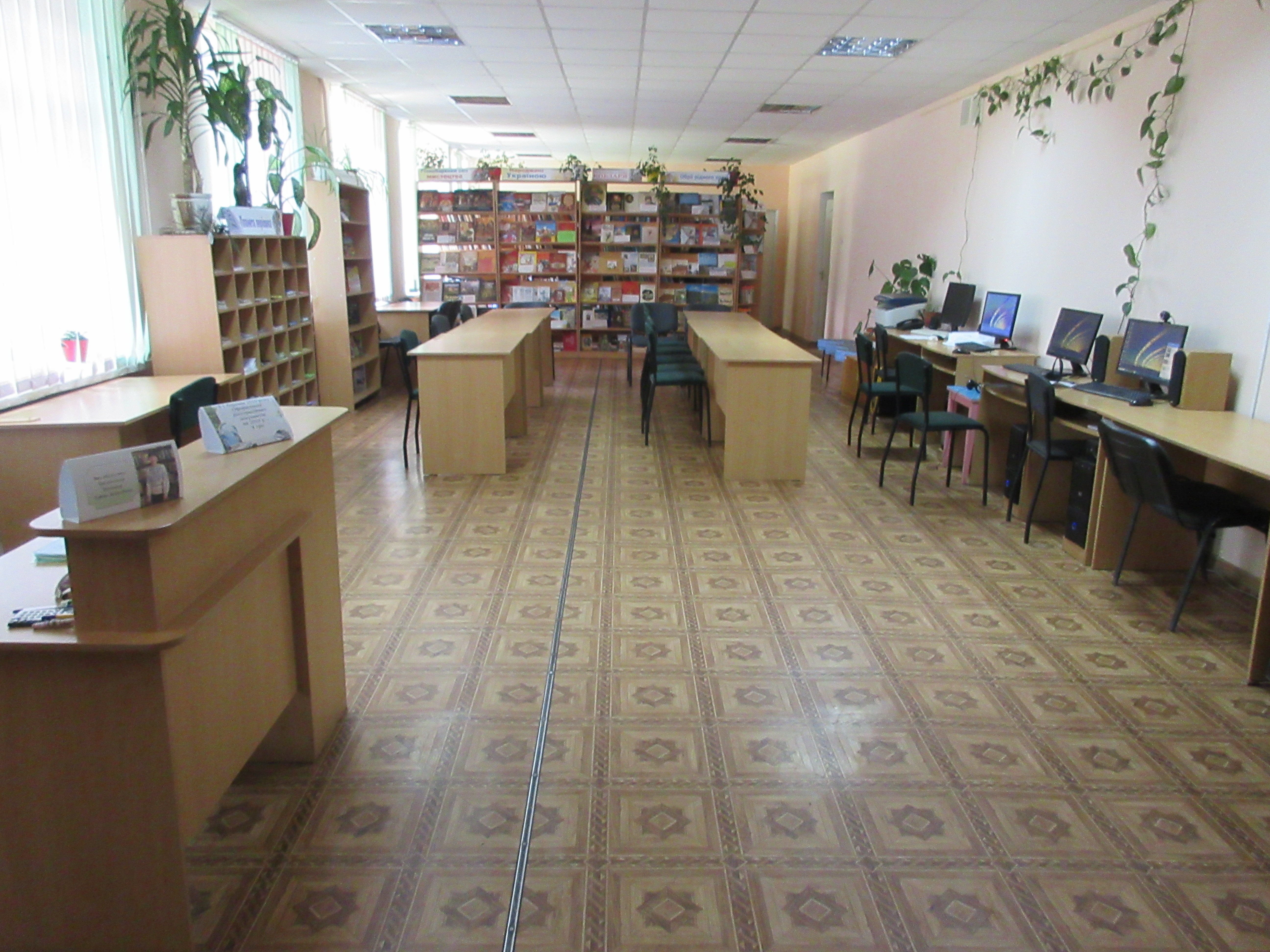 Фотознімок